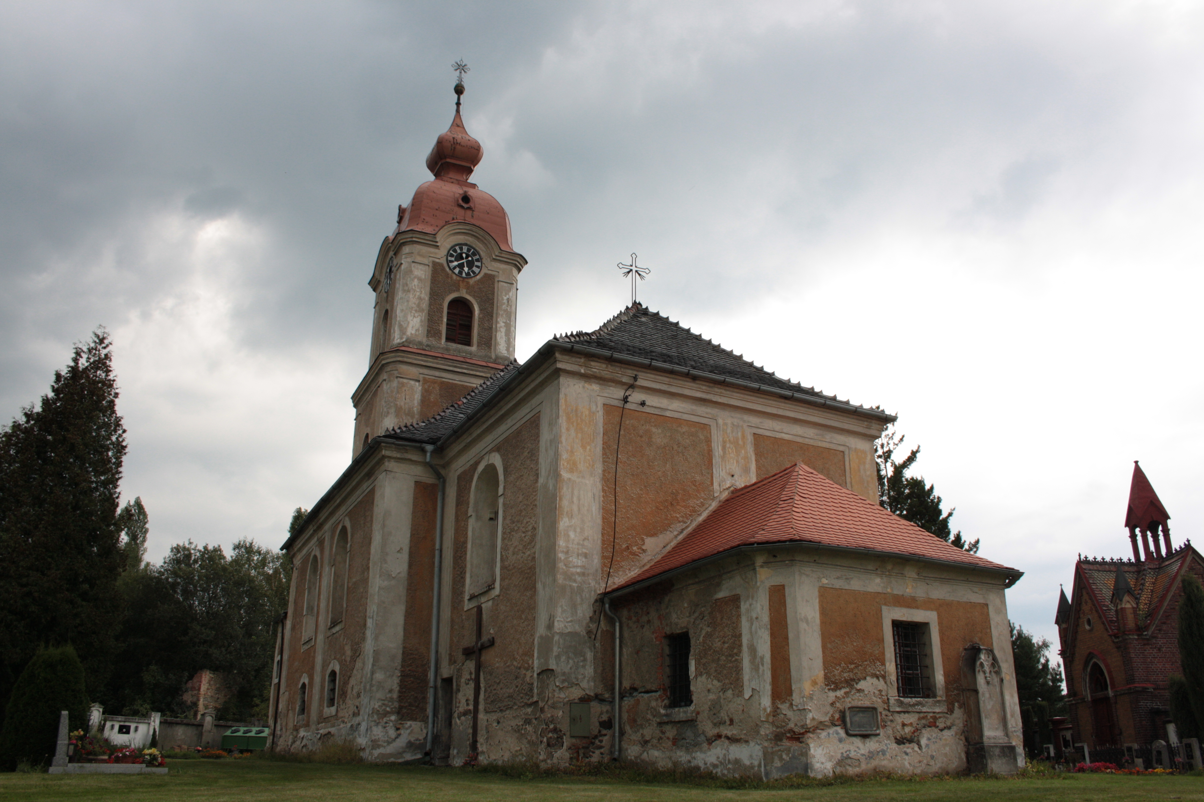 This photograph was taken with a DSLR from WMCZ's Camera grant. Kostel Všech svatých v Kunraticích poblíž Frýdlantu v okrese Liberec.